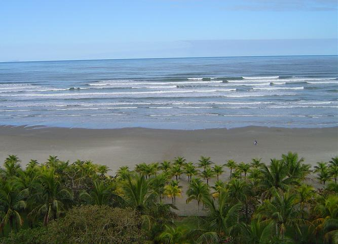 Praia em Bertioga, São Paulo, Brasil.